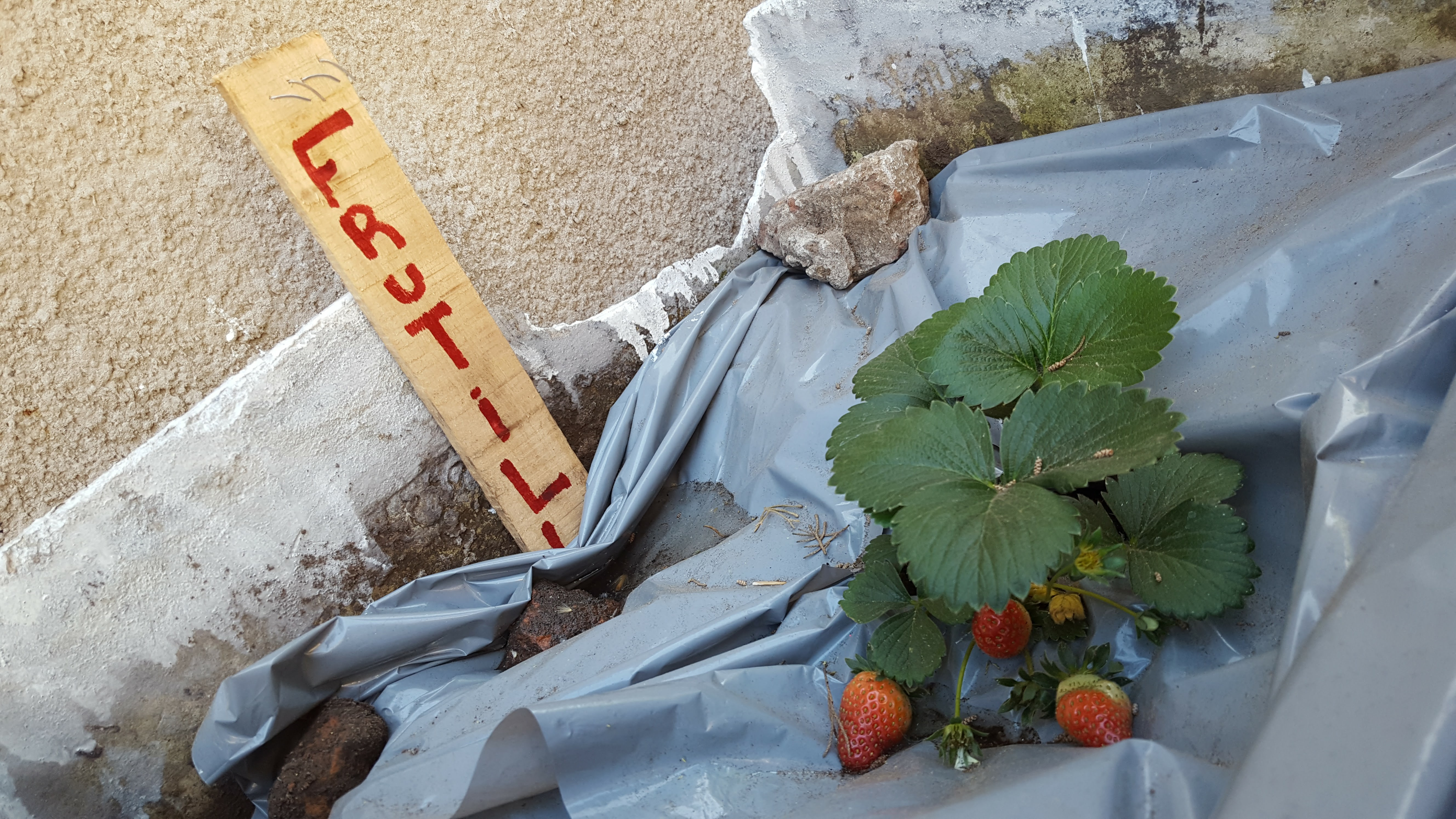 De forma educativa para los alumnos de primario y secundario fue sembrada esta planta de frutillas en la cual ya se pueden ver los primeros frutos. Este y todos los otros trabajos en la huerta han sido realizados por los estudiantes con supervisión de la profesora de Biología.